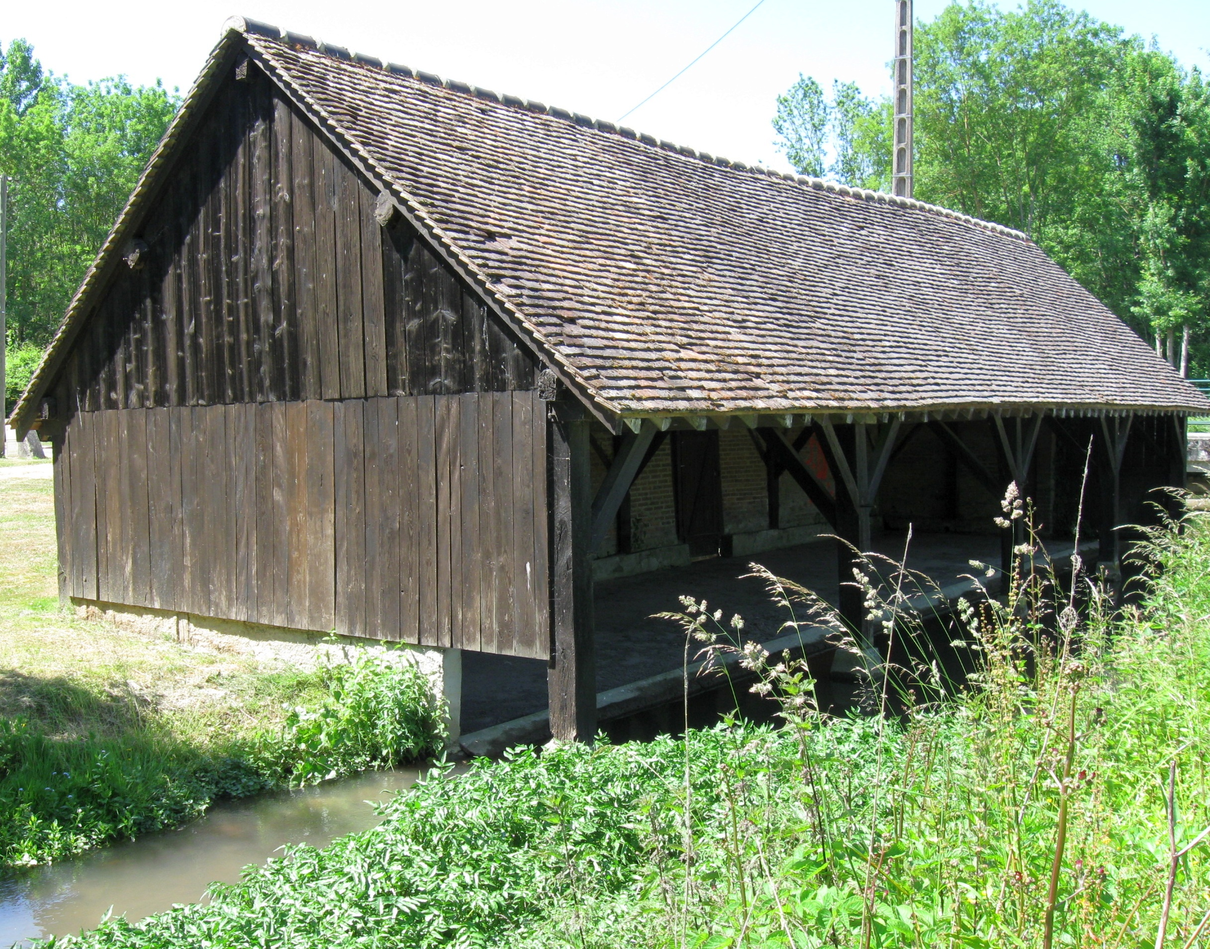 Lavoir construit sur le ru des Méances à Everly. (Seine-et-Marne, région Île-de-France).